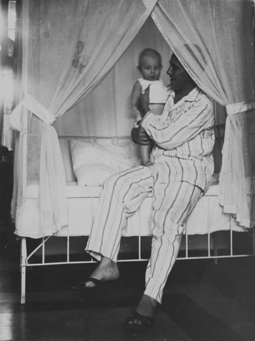 foto. Europese vader in pyjama met zijn zoon op de rand van het kinderbed met klamboe